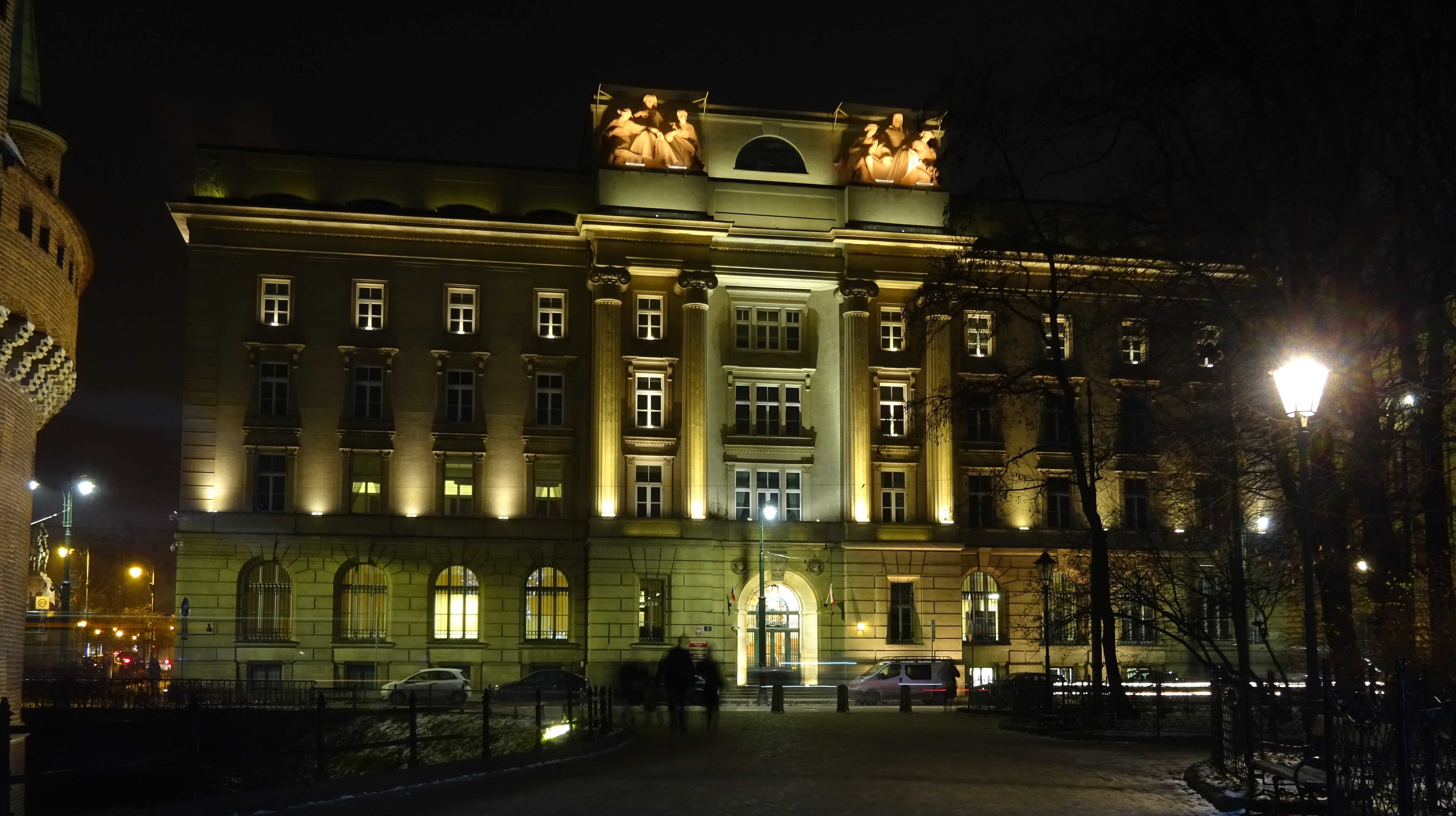 Gmach Narodowego Banku Polskiego w Krakowie. Widok nocny od strony Barbakanu i Bramy Floriańskiej. 2018